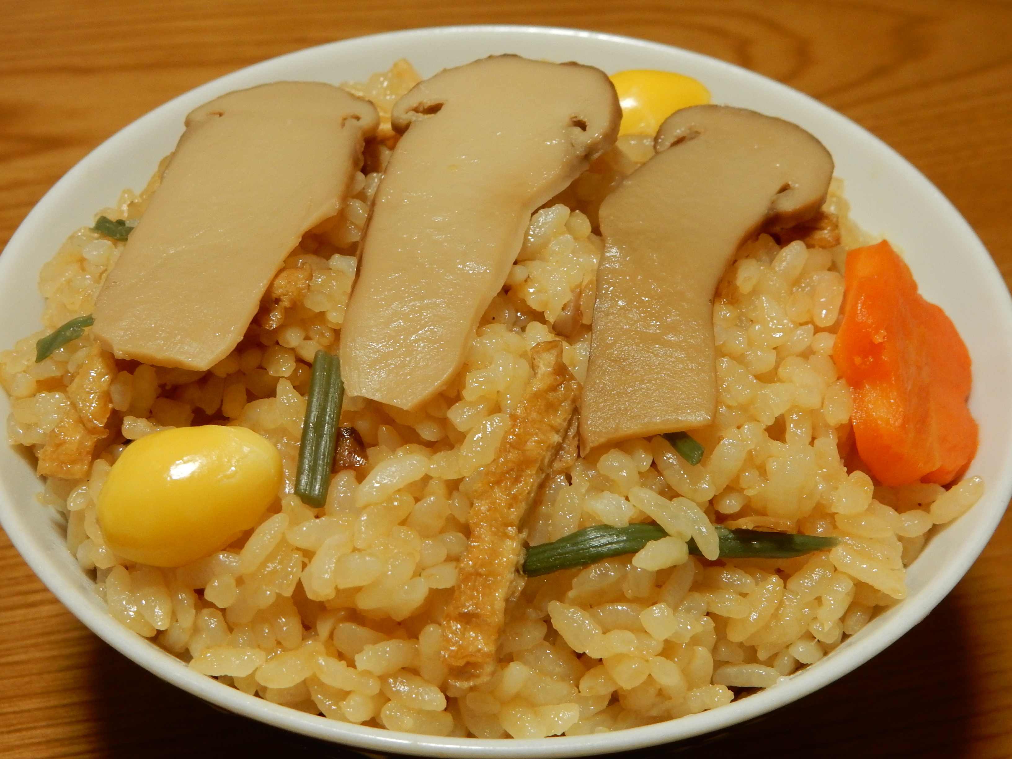 炊き込み御飯の一種、松茸御飯。黄色の物体は銀杏。